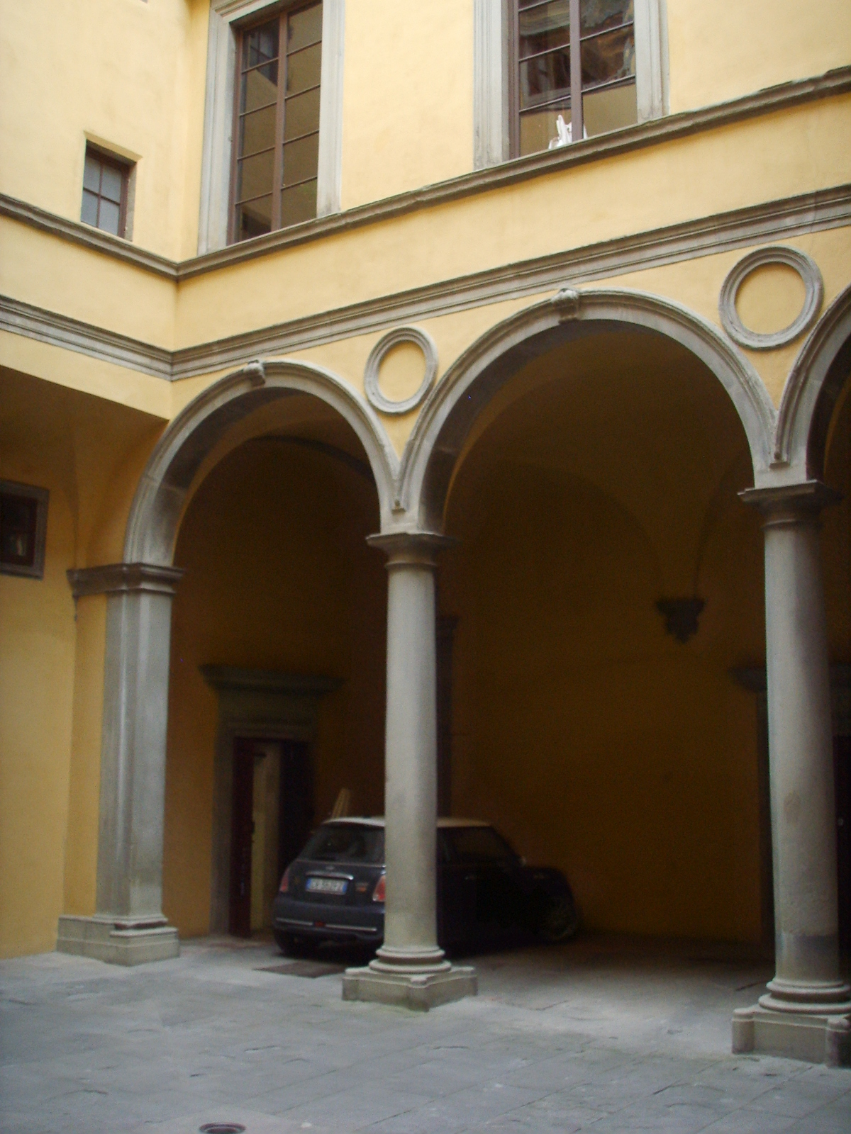 Palazzo Zanchini-Corbinelli, cortile